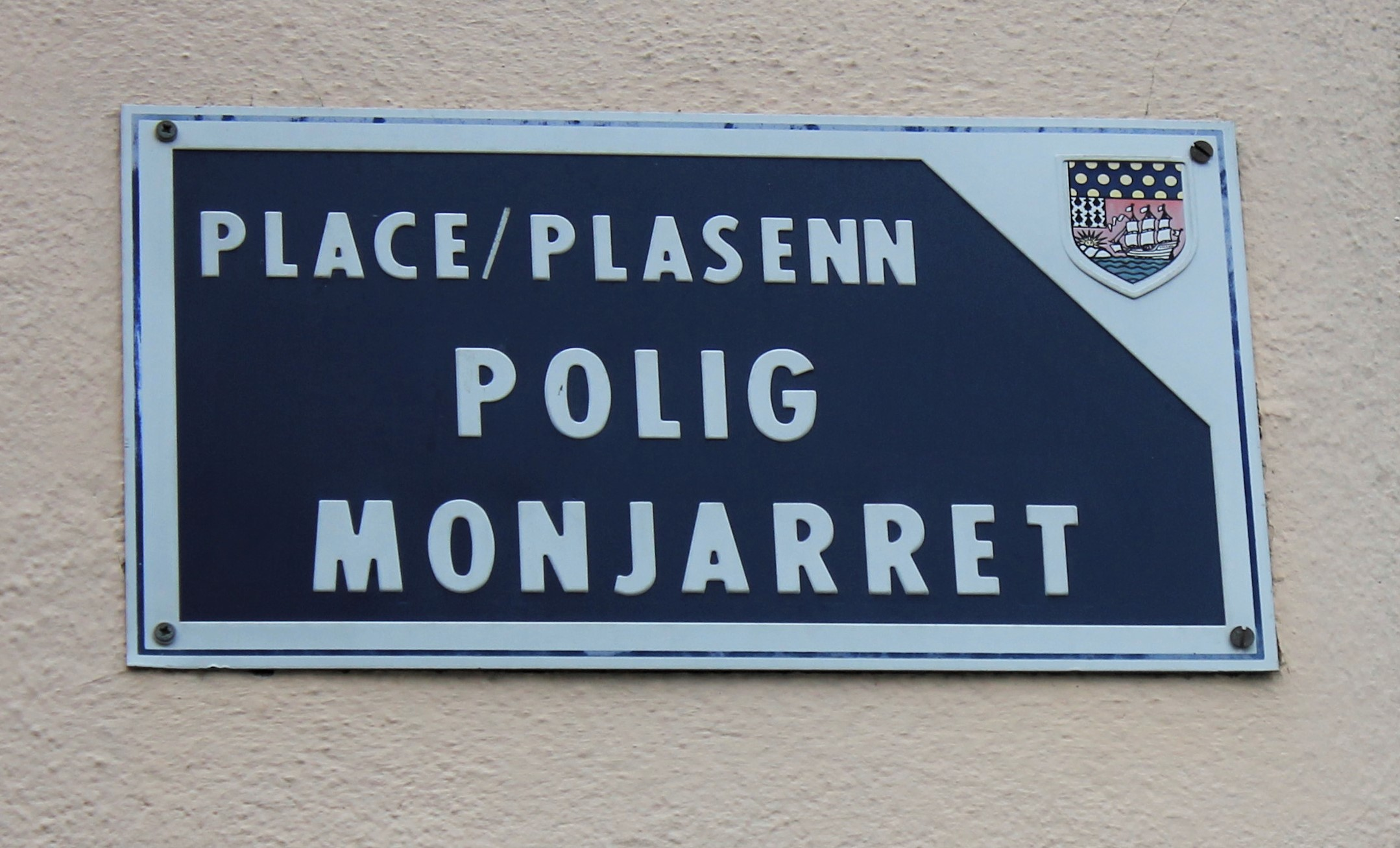 Plaque de la place Polig Monjarret à Lorient.